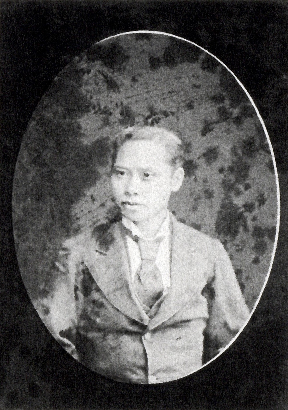 蒔田広孝の肖像写真。